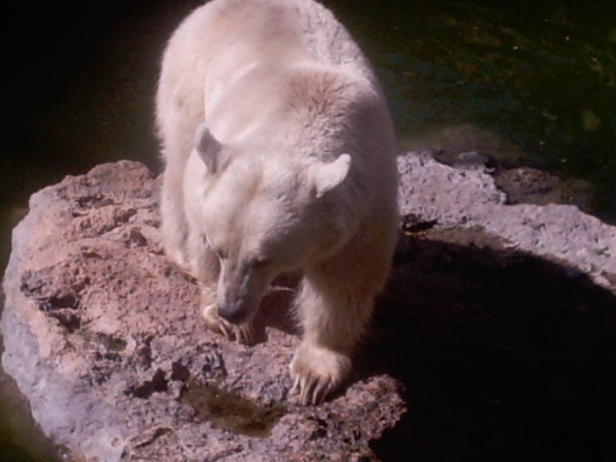 דוב סורי בגן החיות התנכ"י בירושלים